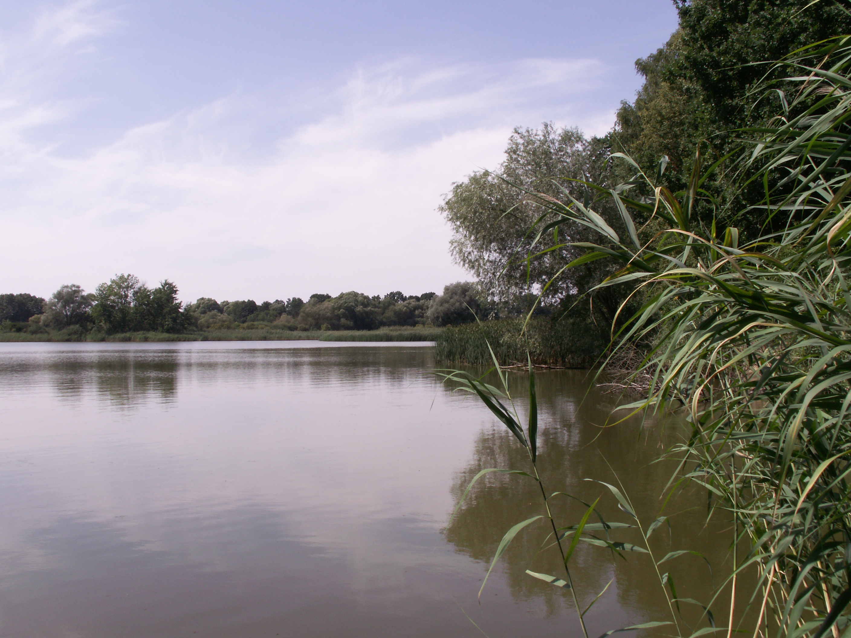 přírodní rezervace Velký Pavlovický rybník, jz. Slezských Pavlovic, okres Bruntál, Moravskoslezský kraj, Kód ÚSOP 2078